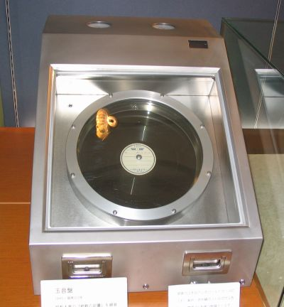 玉音放送で用いられた「玉音盤」（レコード） 撮影者:利用者:sphl NHK放送博物館の展示物。館員の許可を得て撮影。 温湿度を管理した保管庫に入れて展示している（なおオレンジ色は照明の写り込み）